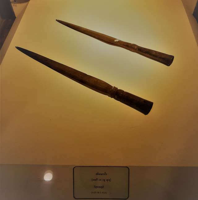 မြန်မာဘာသာ: အဲမောင်းသည်ရှေးမြန်မာတပ်မတော်သုံး အမွှေးဖွားလှံဖြစ်သည်။